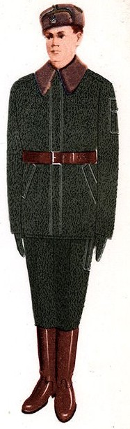 Ubiór ćwiczebny zimowy żołnierza zsw (wojska lądowe)